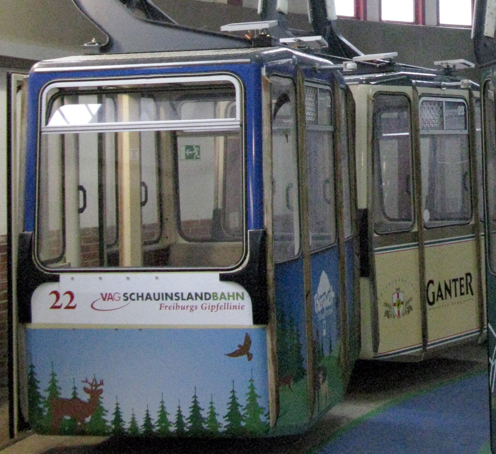 Kabinen der Freiburger Schauinslandbahn mit Photovoltaikmodulen auf dem Dach für die Lüftung